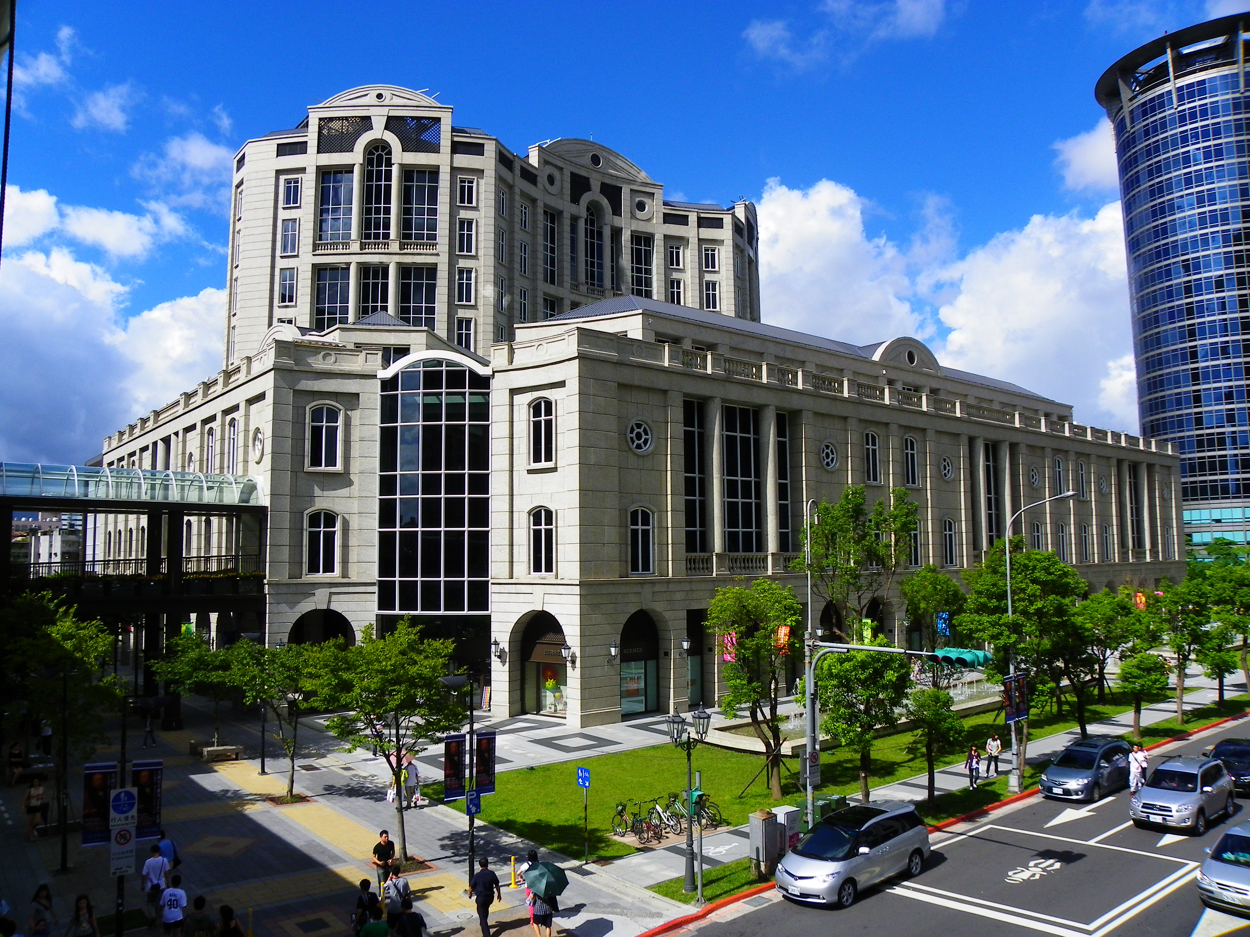 中文（台灣）: 寶麗廣場，攝於新光三越信義新天地A4館與A8館間天橋。